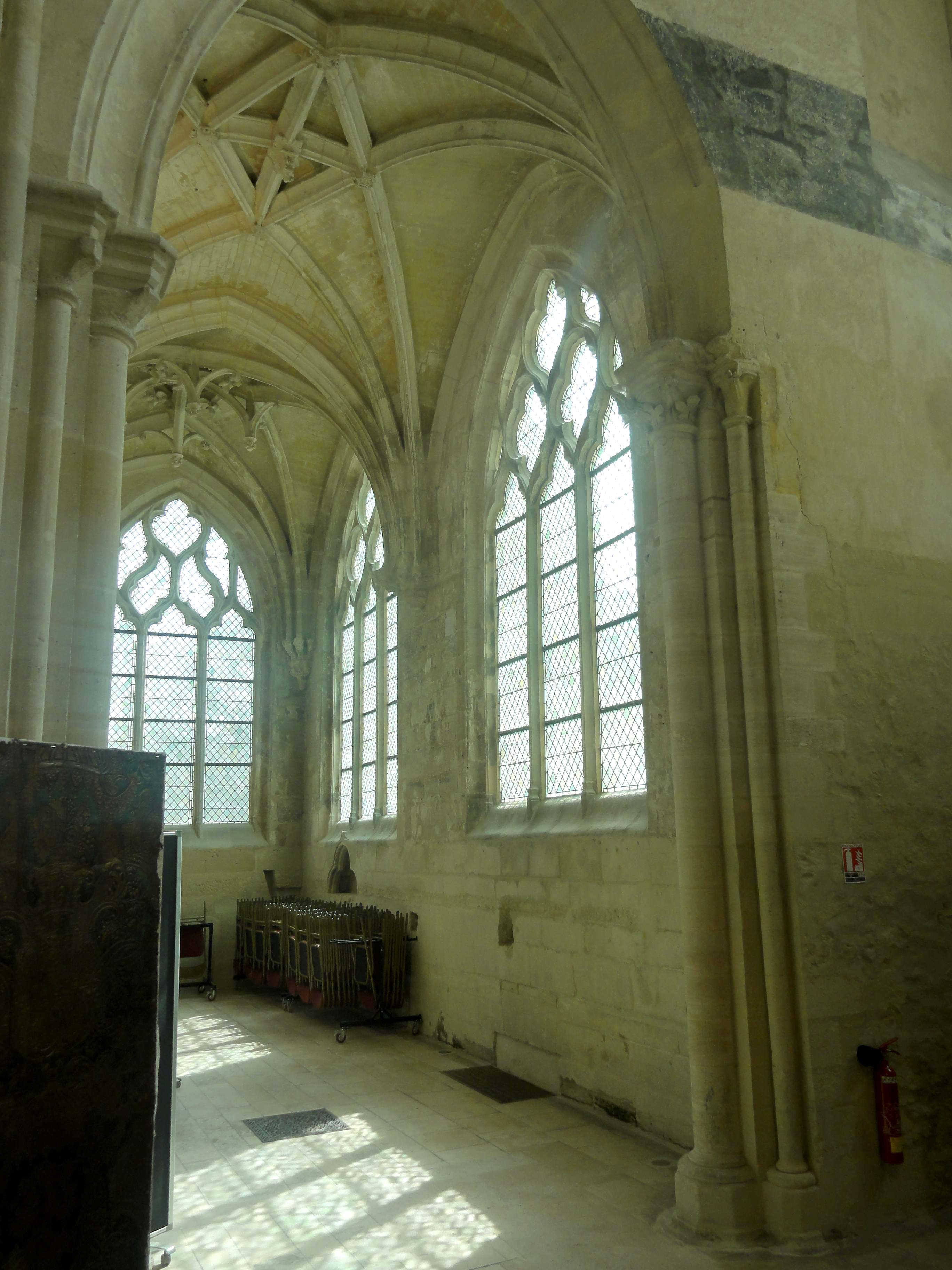 Intérieur de l'église - voir titre.